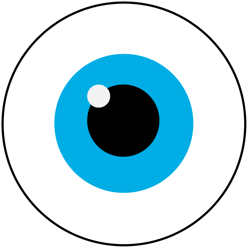 Es una "réplica" de la simbología utilizada por el ojo de iberoamérica. Ojos similares a este son muchas veces utilizados en el festival.